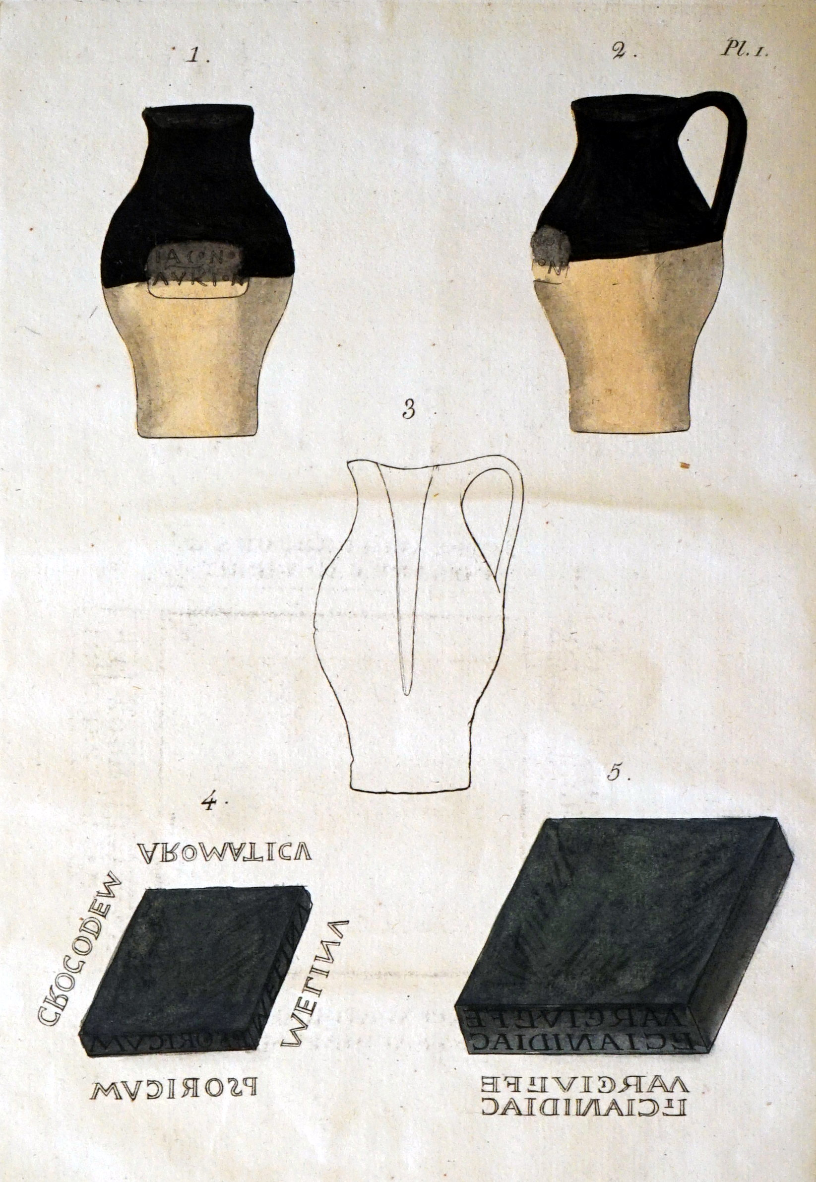 dissertation sur "Cachets antiques des médecins 0culistes".